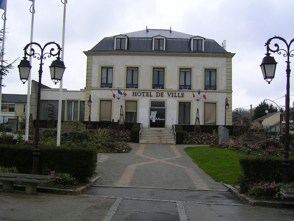 Hotel de ville Photo personnelle (own work) de Marianna